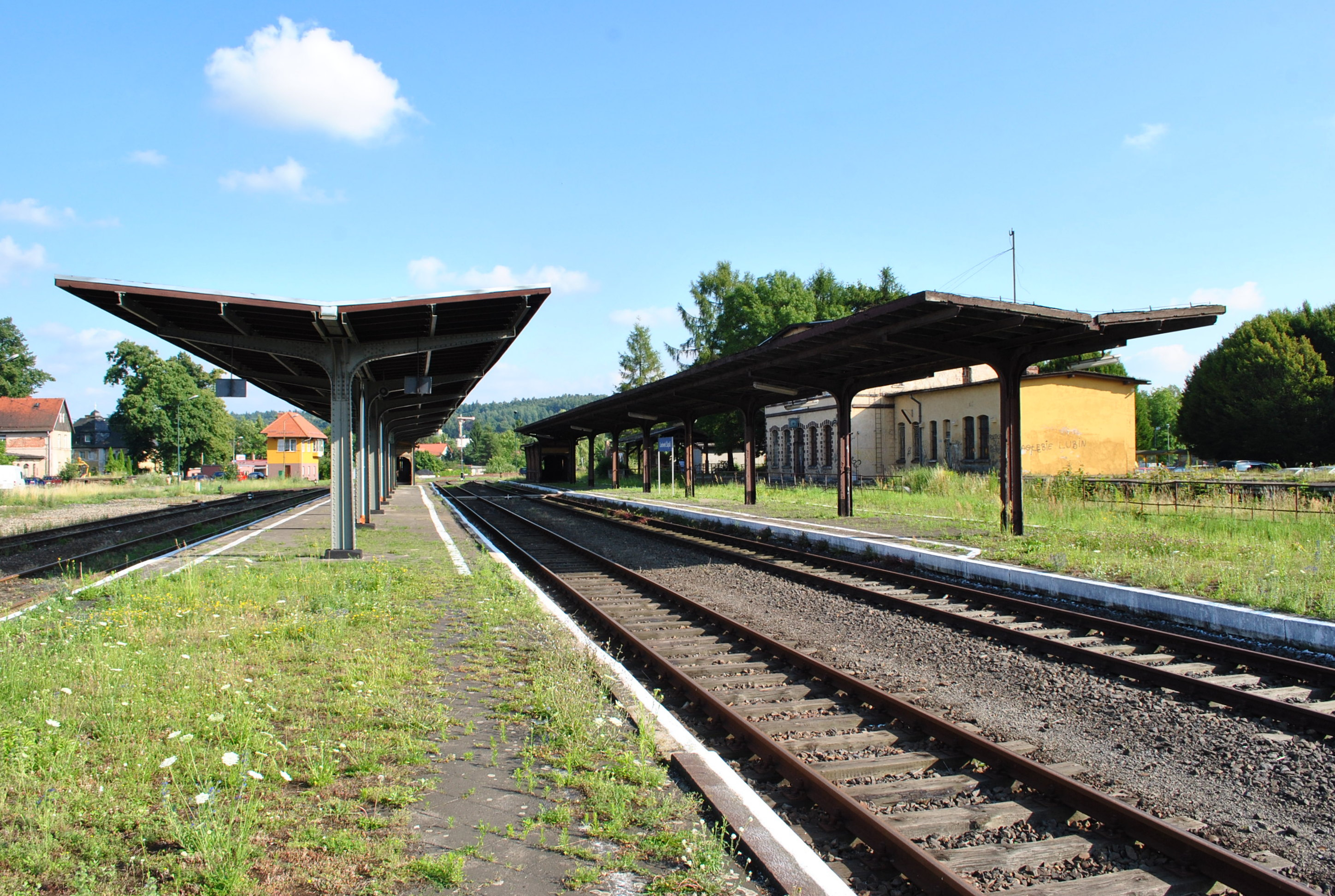 Perony na stacji Lwówek Śląski